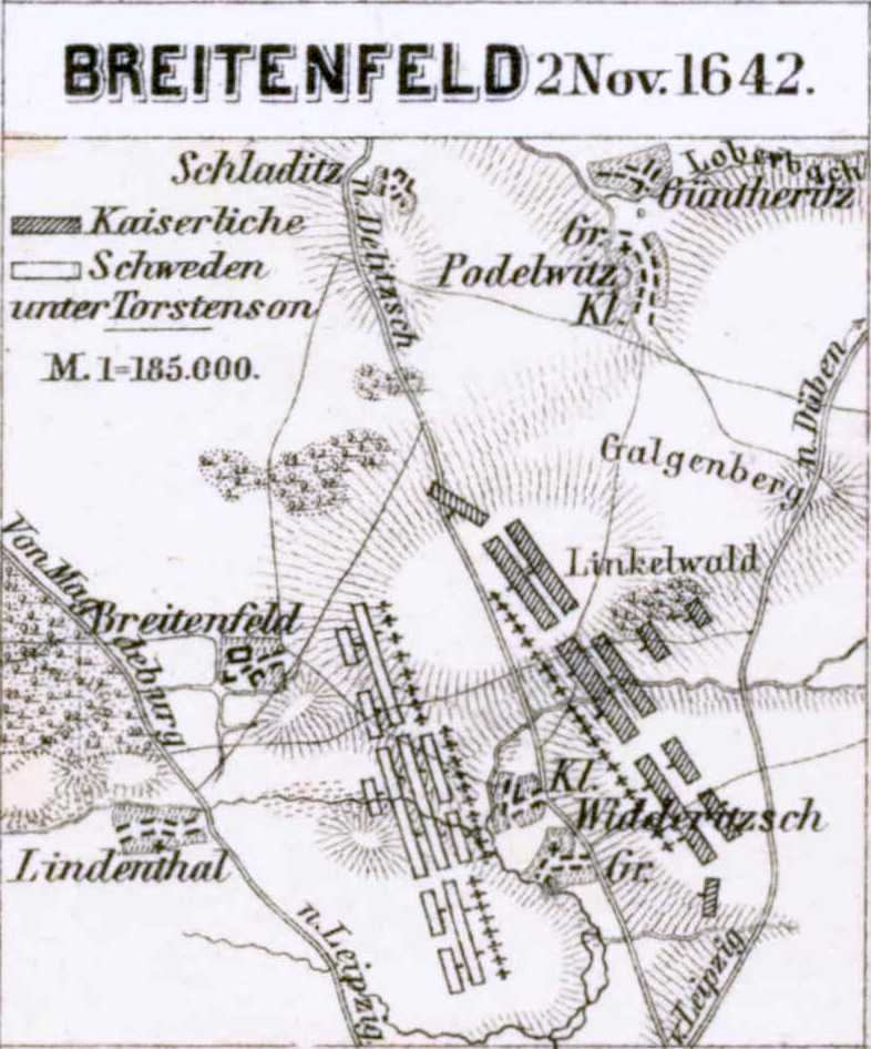 Schlacht bei Breitenfeld, 2. Nov. 1642